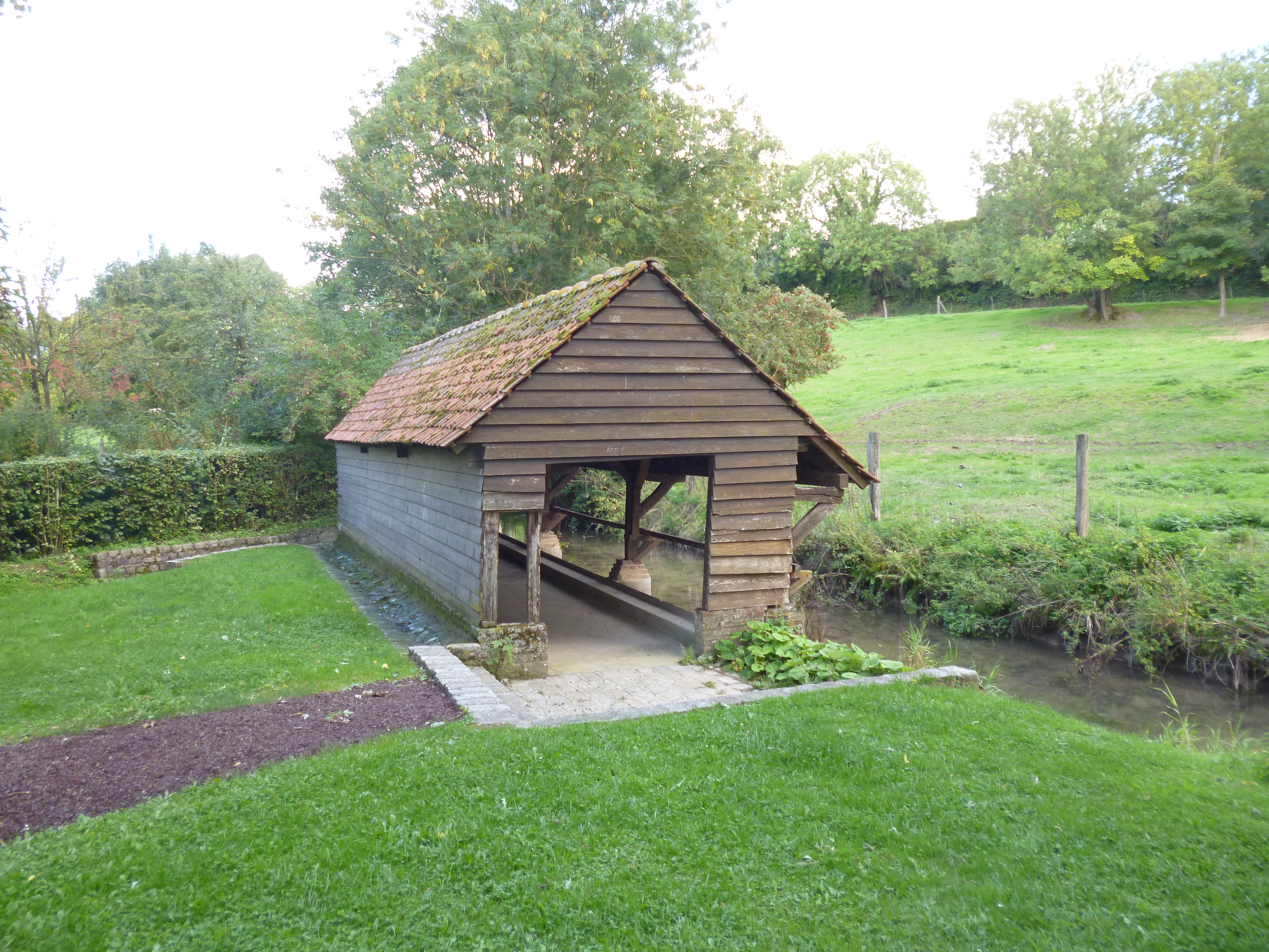 Lavoir de Saint-Remy-en-l'Eau (Oise).